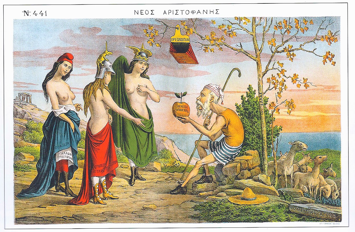 Γελοιογραφία από τον 'Νέο Αριστοφάνη'.